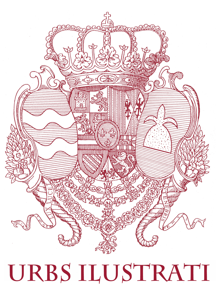 “Almacelles, urbs ilustrati” com a element gràfic identificador del municipi d’Almacelles per promocionar el passat il•lustrat de la població fundada en el segle XVIII. Aquest logotipus acompanyarà a l’escut municipal en els oficis i altra documentació municipal.